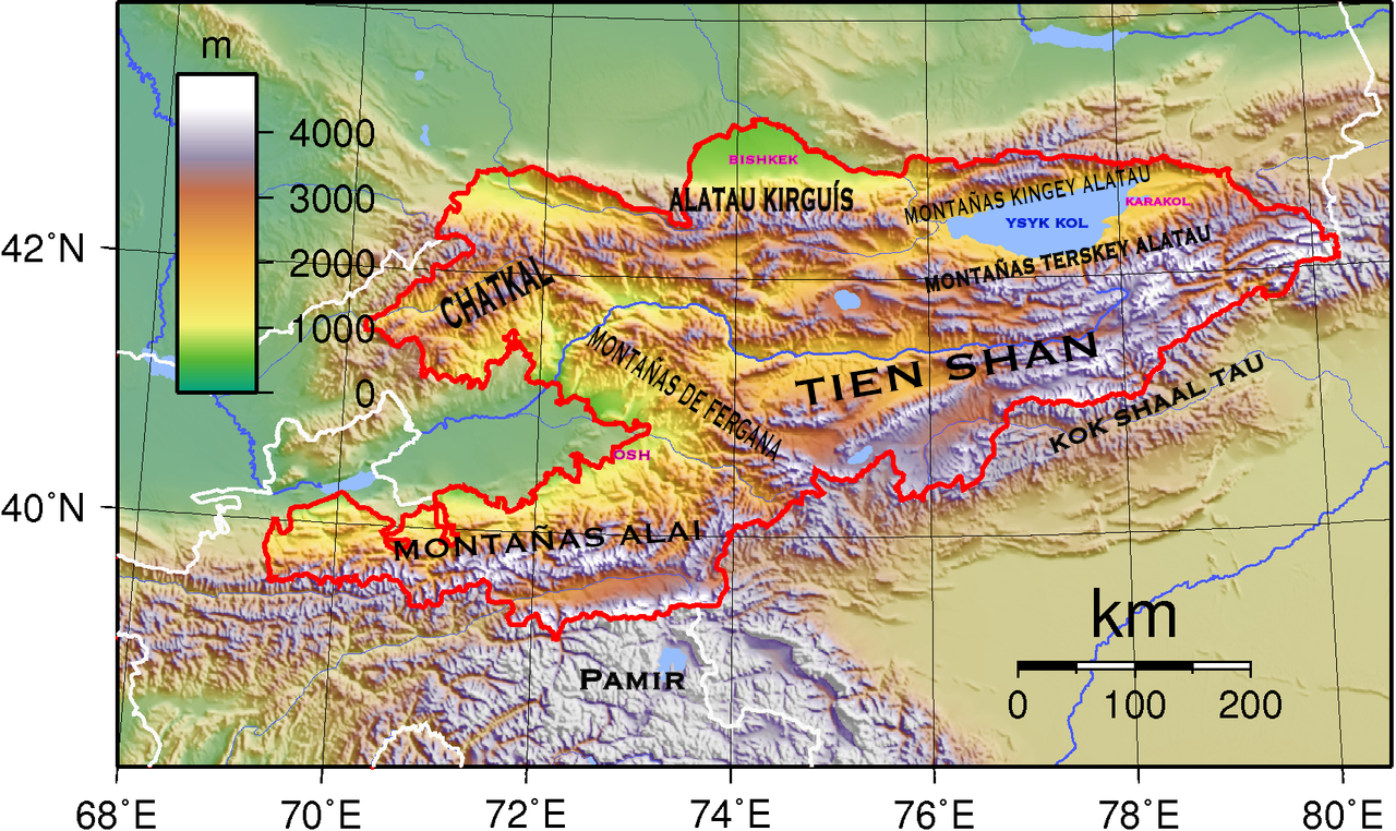 Nombres de cordilleras en mapa topográfico de Kirguistán